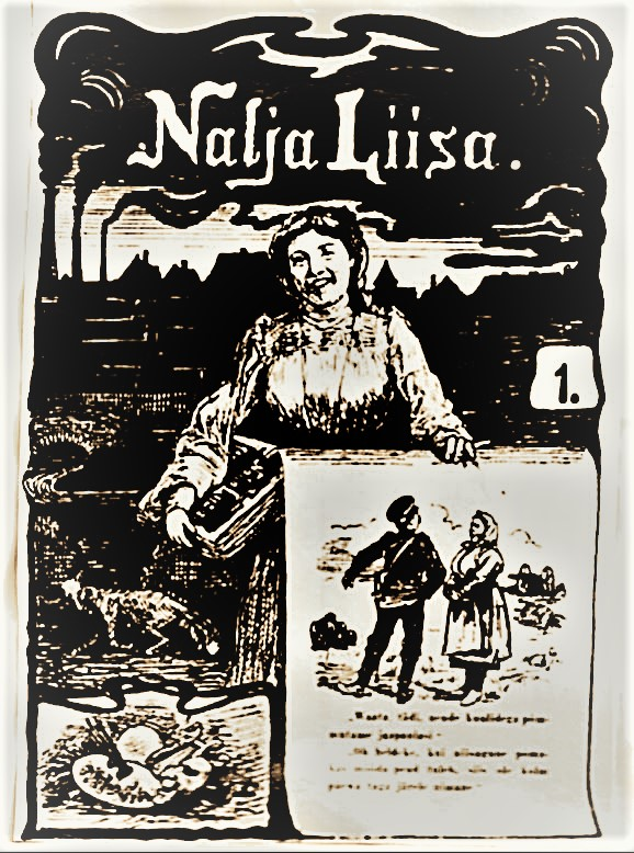 Ajakirja Nalja Liisa 1904 esileht